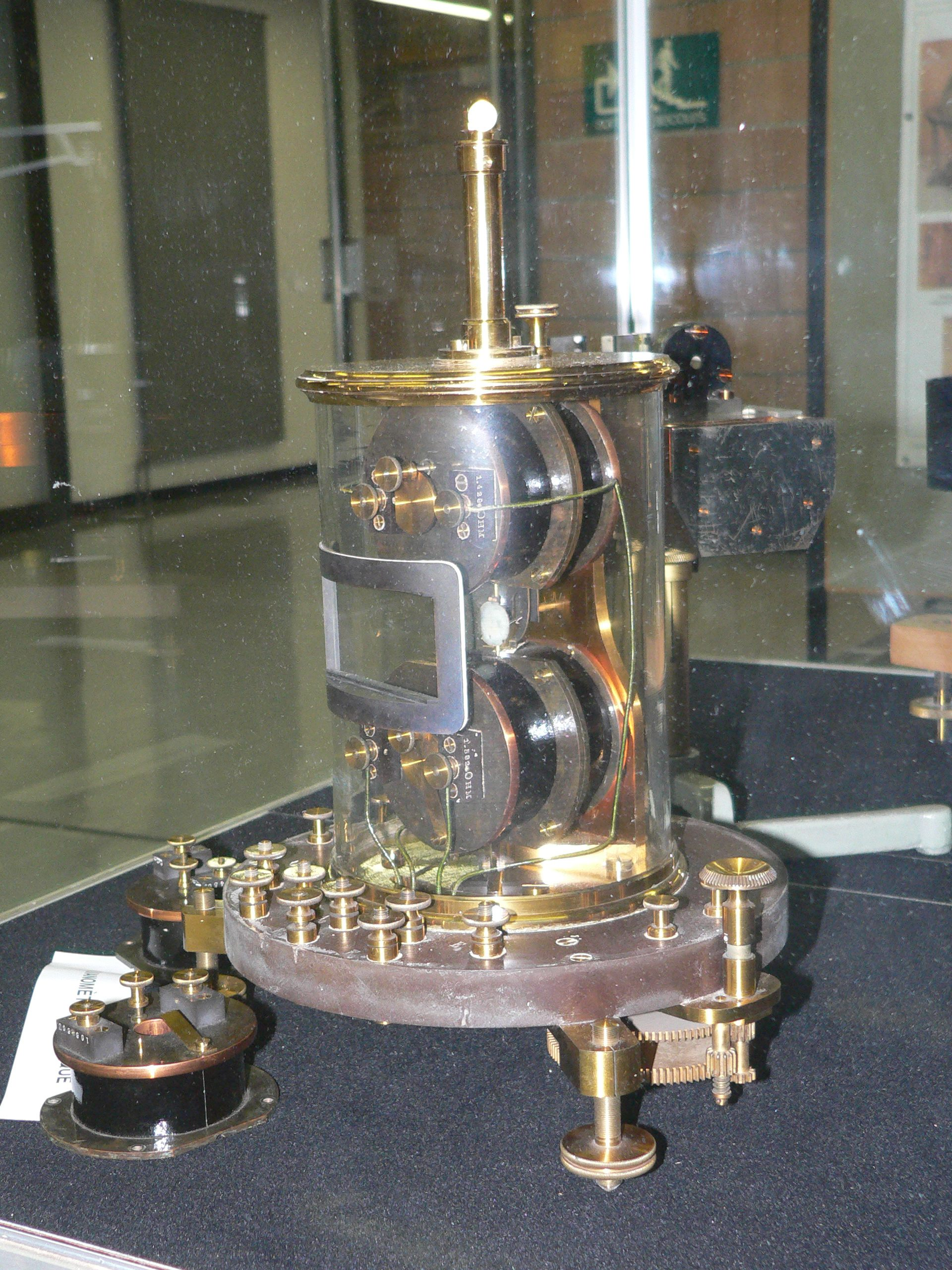 Astatic galvanometer